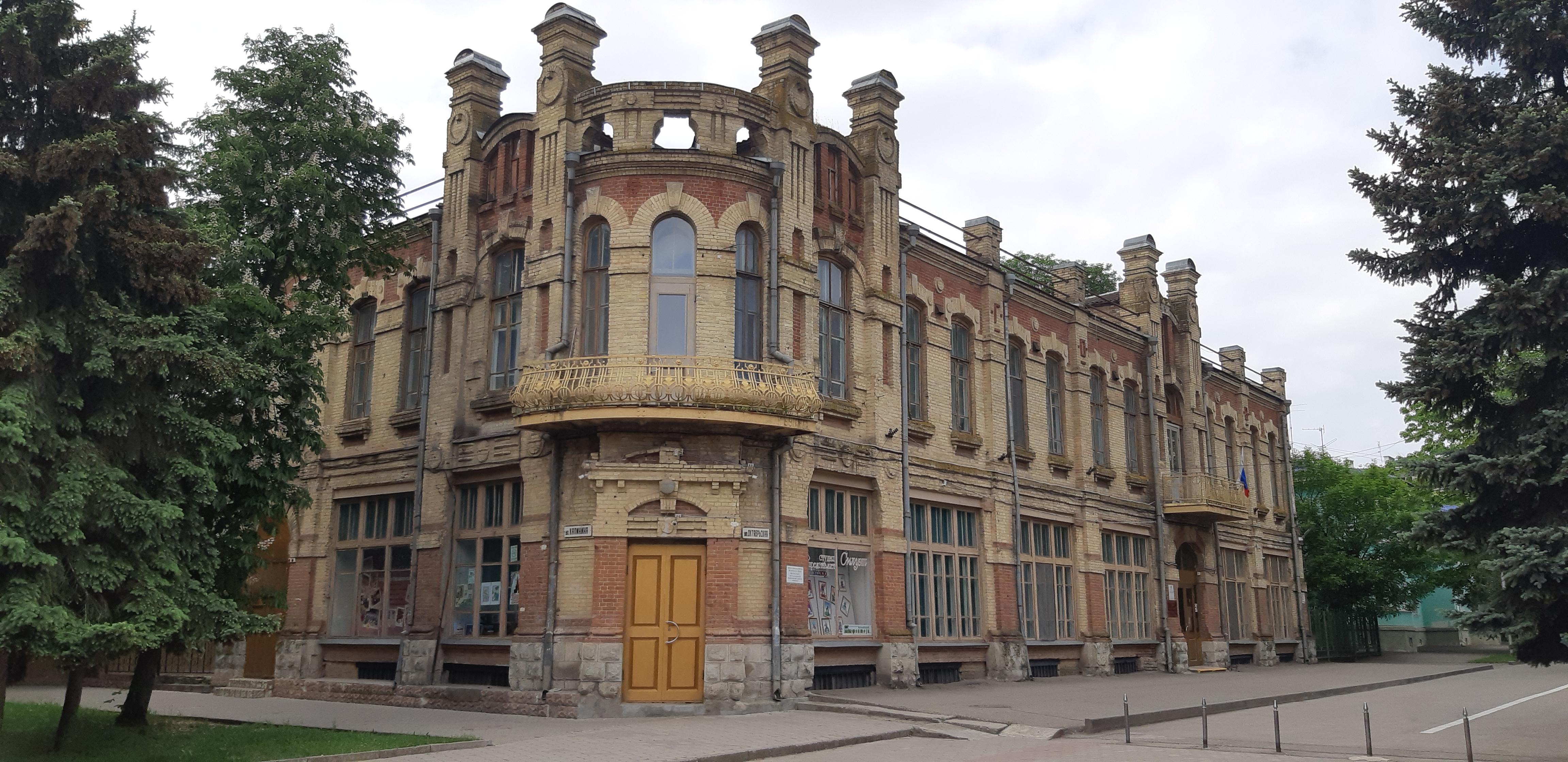 Здание Георгиевского общества взаимного кредита. 1912 год.